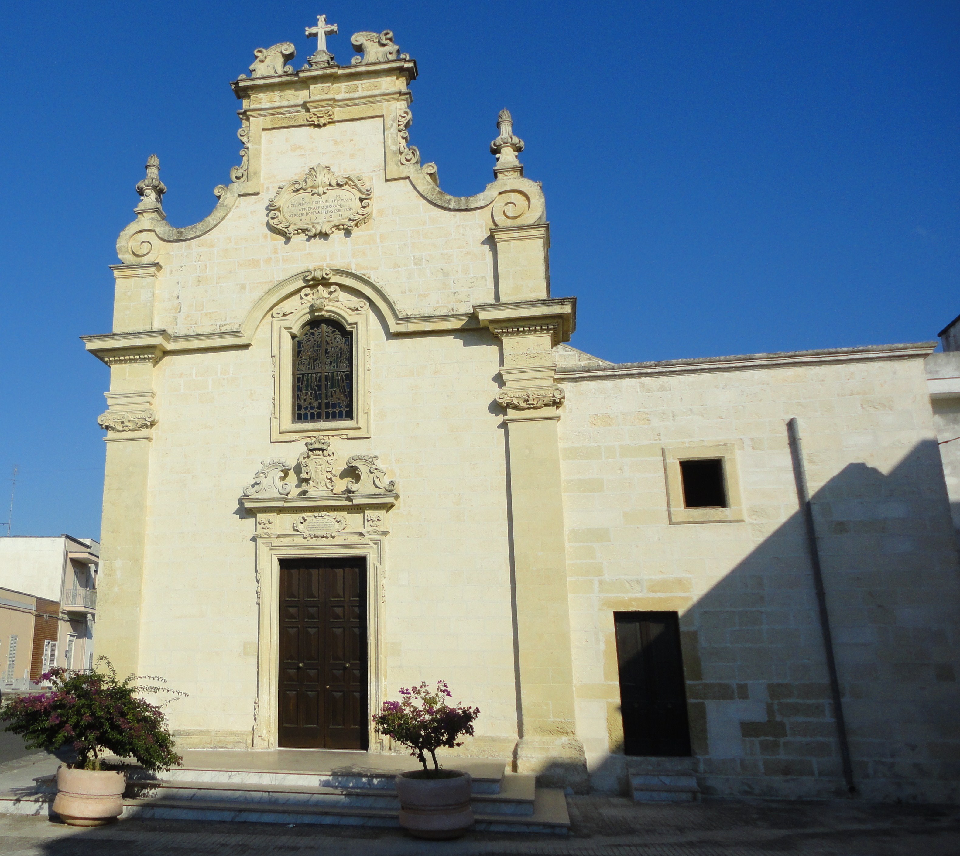 Chiesa dei Santi Medici Melendugno, Lecce